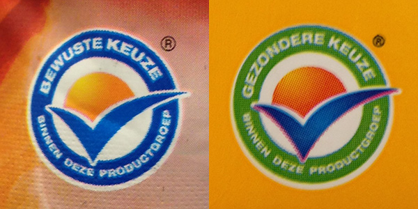 Beide 'Het Vinkje' logo's zoals op een pak soep en op een pak light chocolademelk